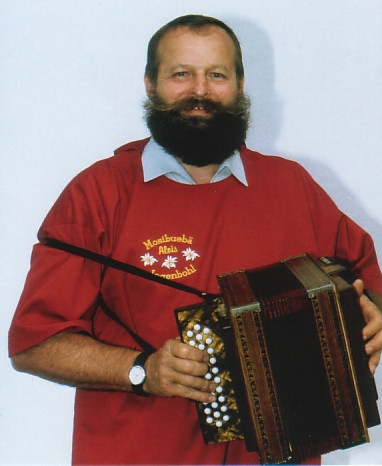 Porträt Alois Lüönd. Mitglied beim SQ Mosibuebä und den Balmbergörgelern. Wohnhaft in Ingenbohl Kanton Schwyz.